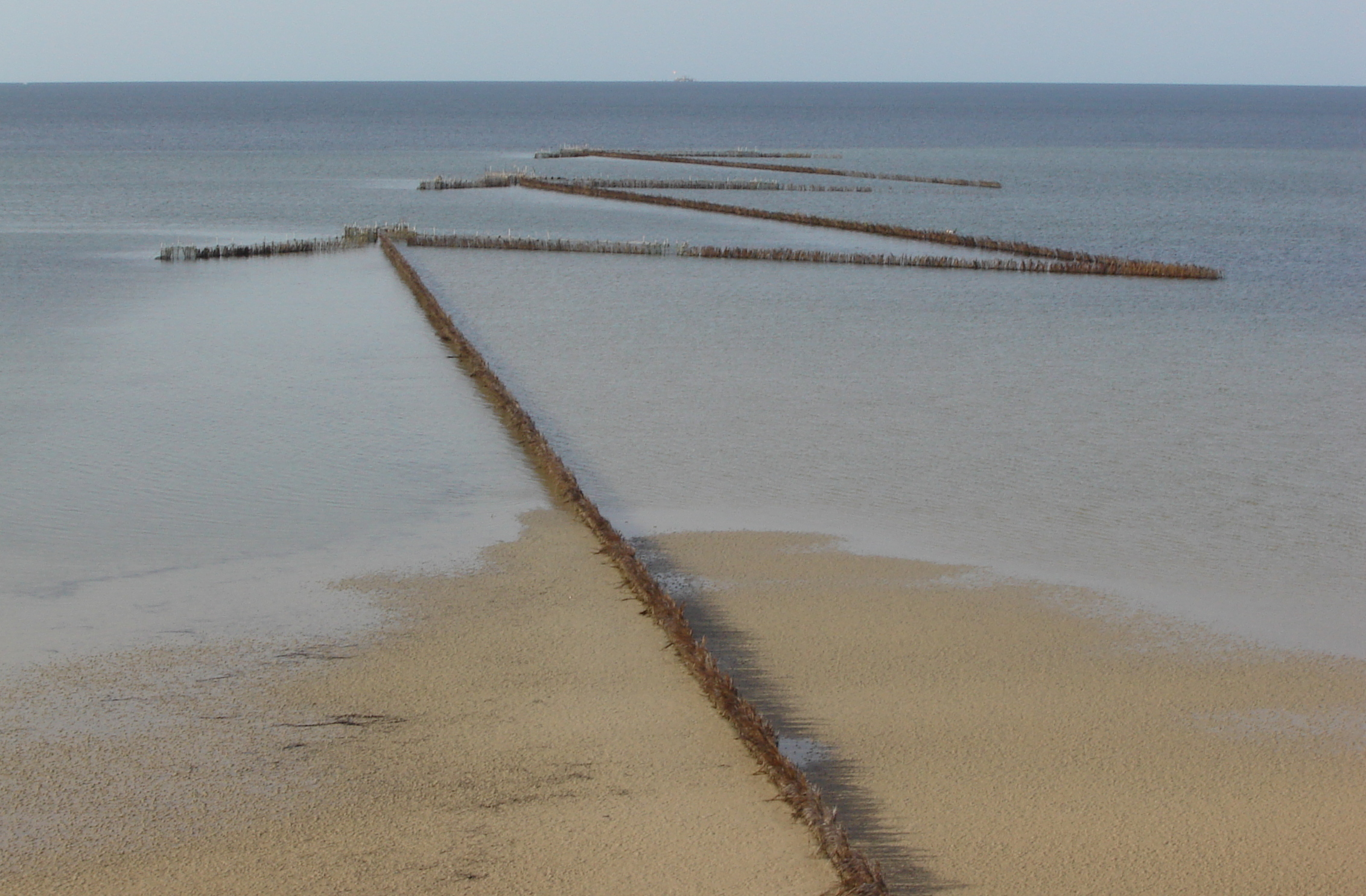 Photographie personnelle prise en juillet 2007 à Kerkennah en Tunisie (lieu-dit jorf dans l'île de Gharbi). On observe la disposition en flèche des pêcheries en situation de proximité du rivage.